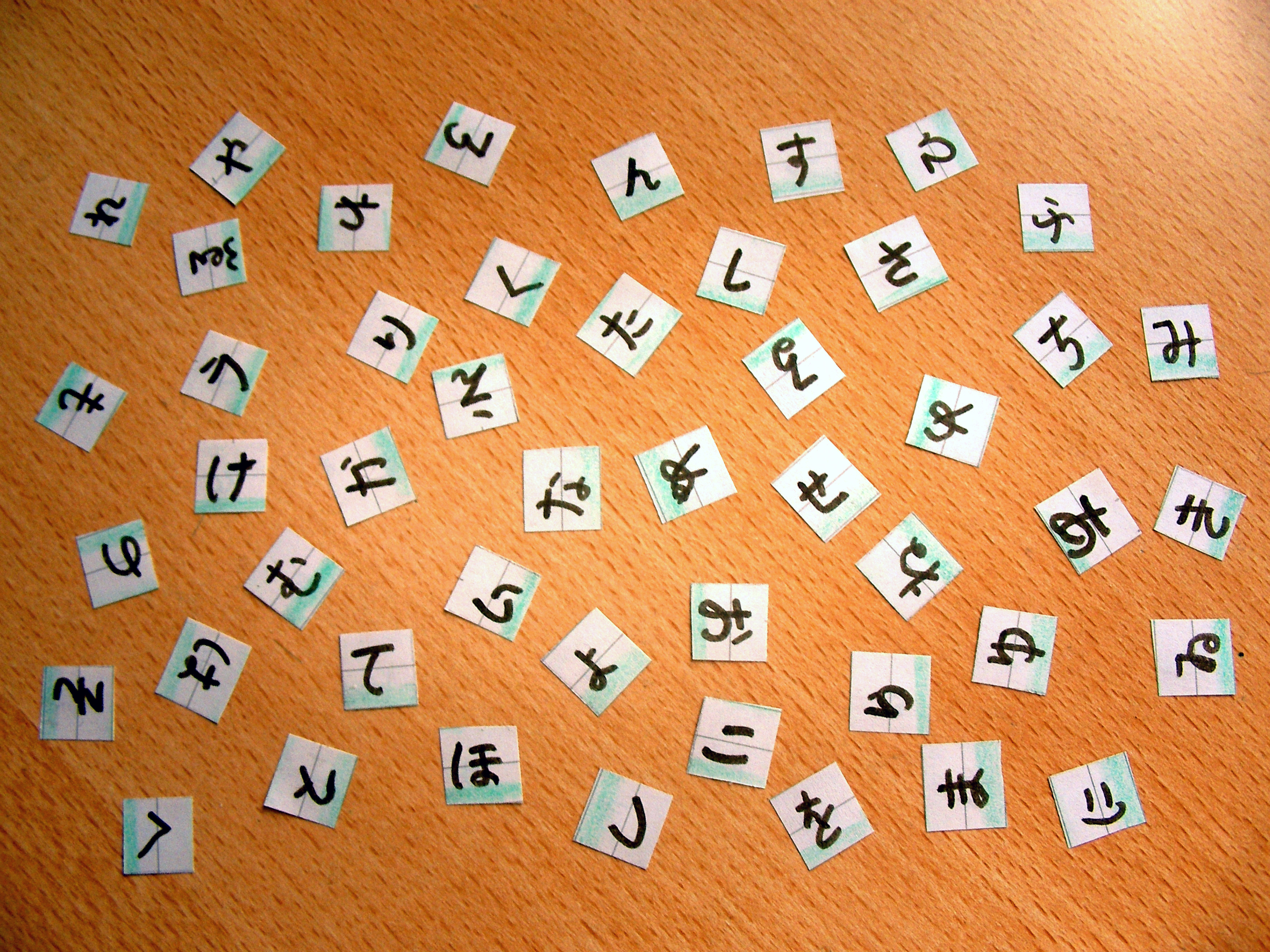 Todos los grafemas de hiragana, incluyendo los obsoletos we y wi pero excluyendo los derivados, manuscritos en papelitos desordenados.